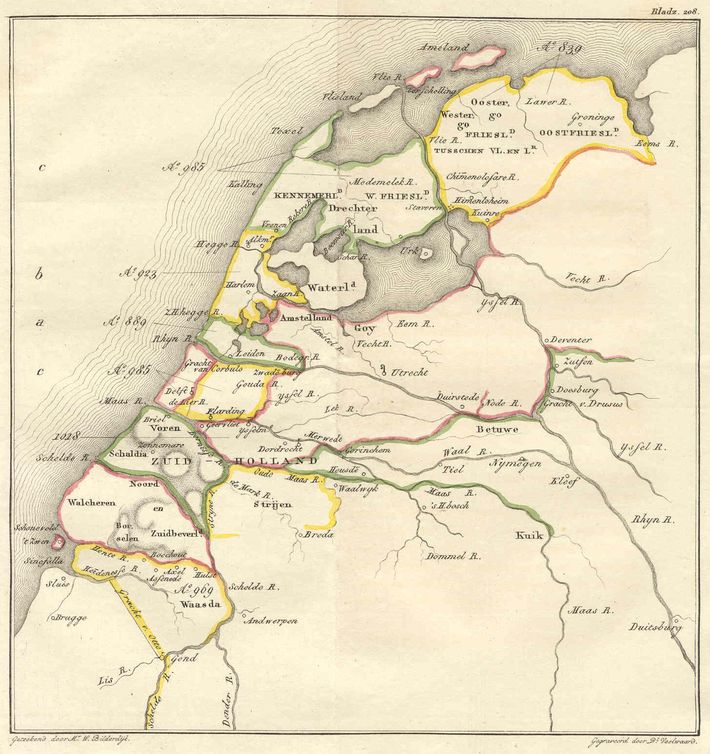 Bestuurlijke kaart van Nederland omstreeks jet jaar 1000. Reconstructie door Willem Bilderdijk zie ook: (Deze link is 'niet de bron)